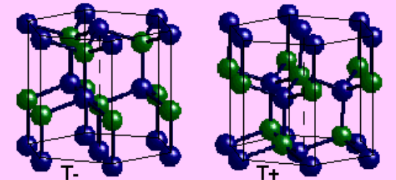 Paketatze hexagonal trinkoan dauden hutsune tetraedrikoak